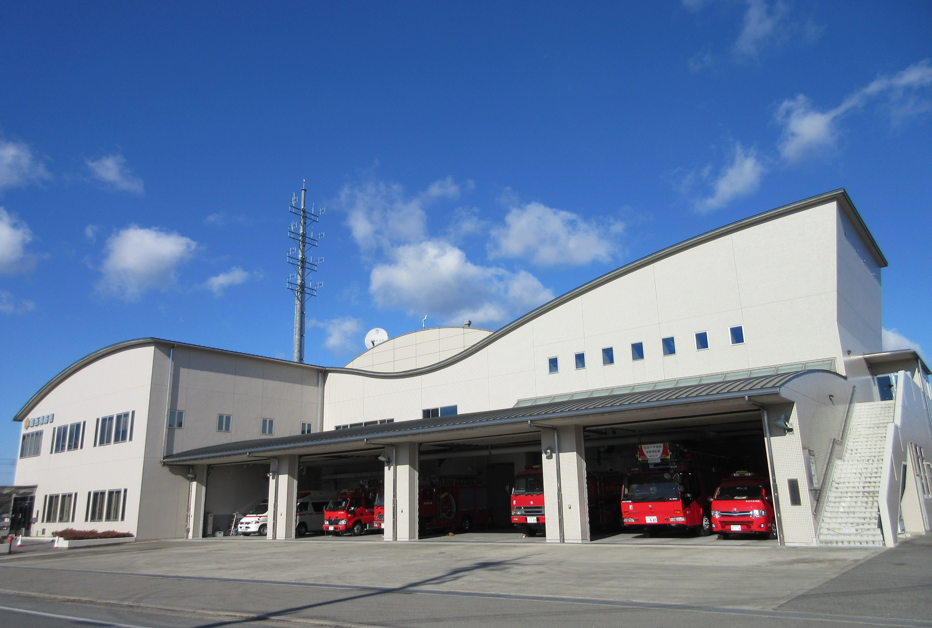 北はりま消防本部加西消防署